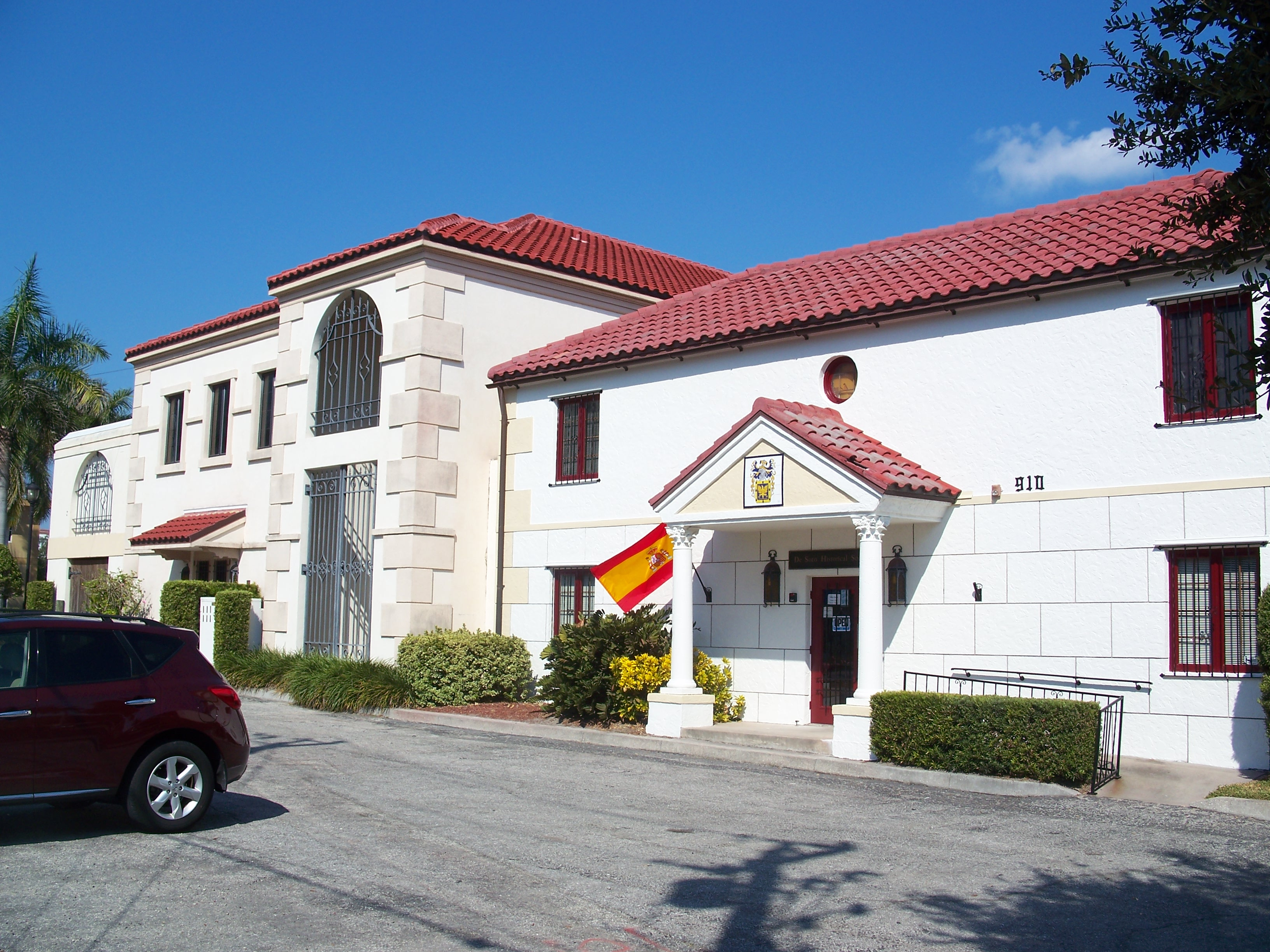 Bradenton, Florida: South Florida Museum